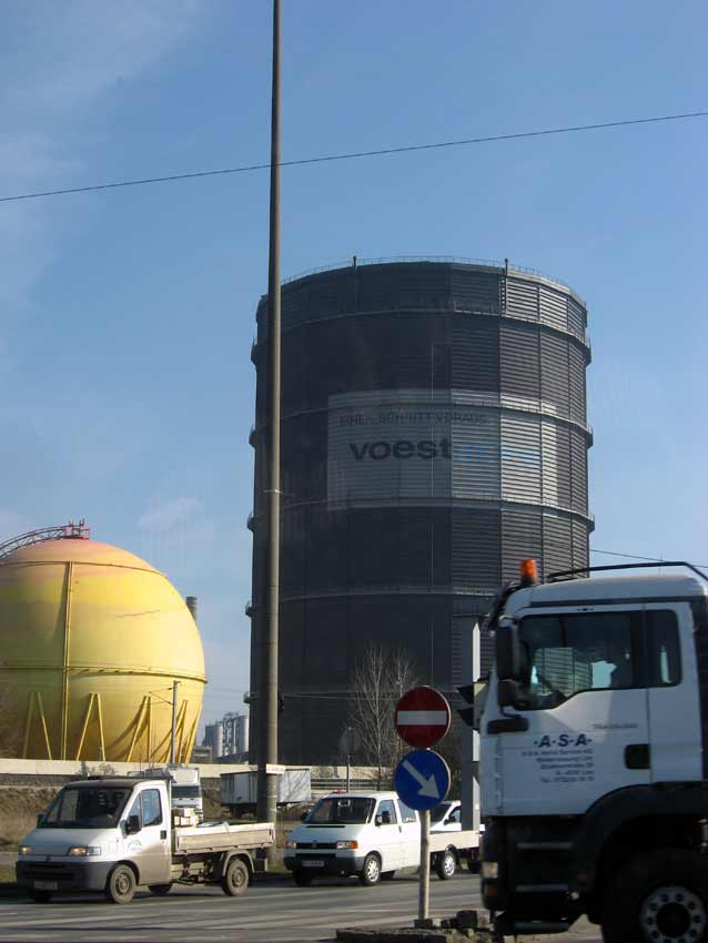 Ein Gasometer der Voest in Linz, ein weithin sichtbares Industriebauwerk